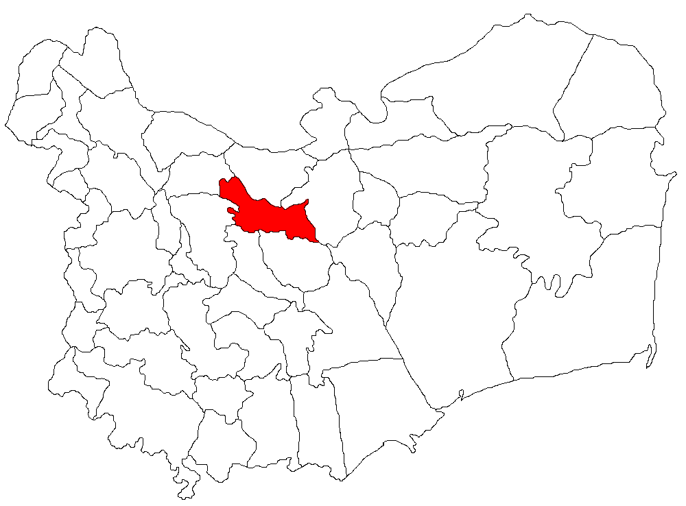 Categorie:Hărţi ale judeţului Tulcea